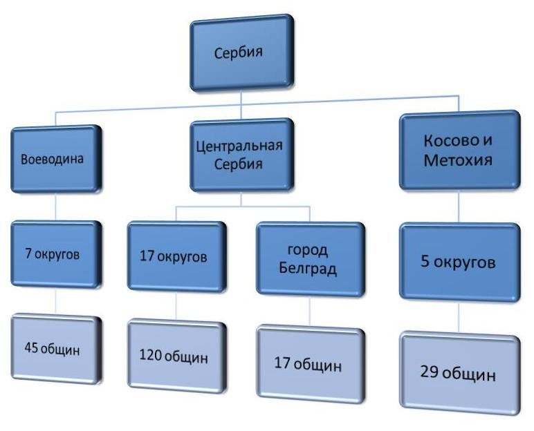 Схема административно-территориального деления Сербии